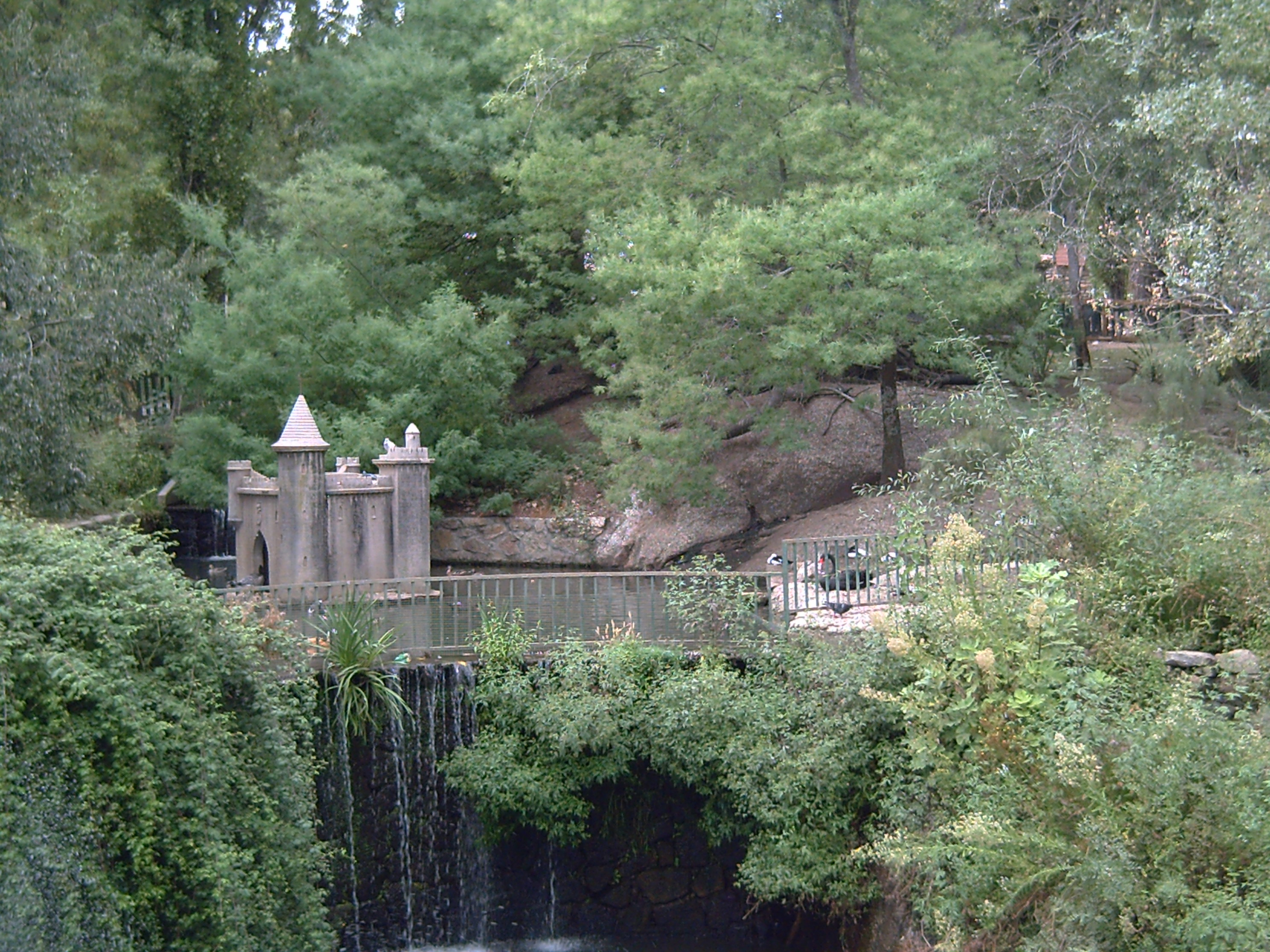 Parque "Los Pinos" en Plasencia, Extremadura (España)